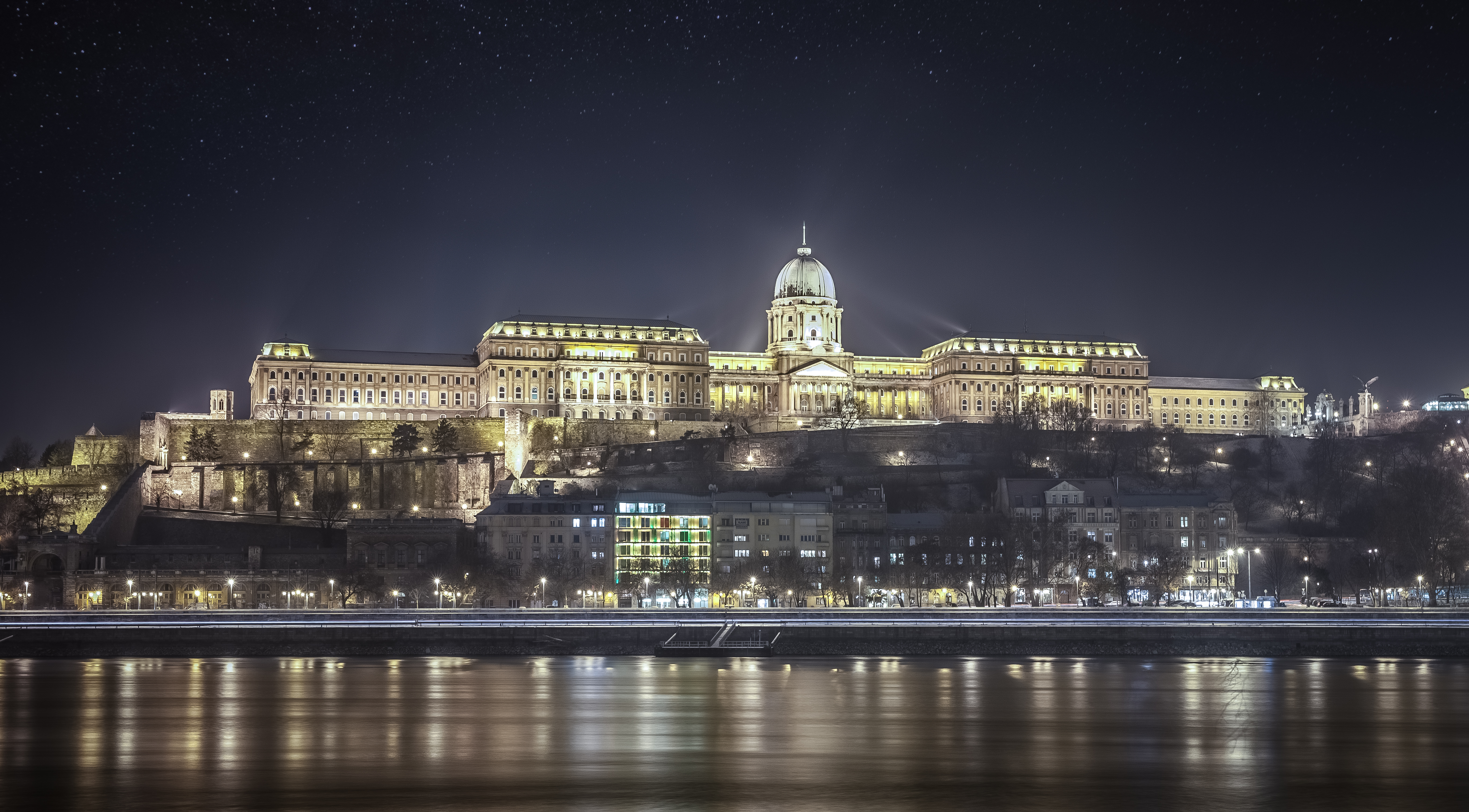 61/365²: Opulencia